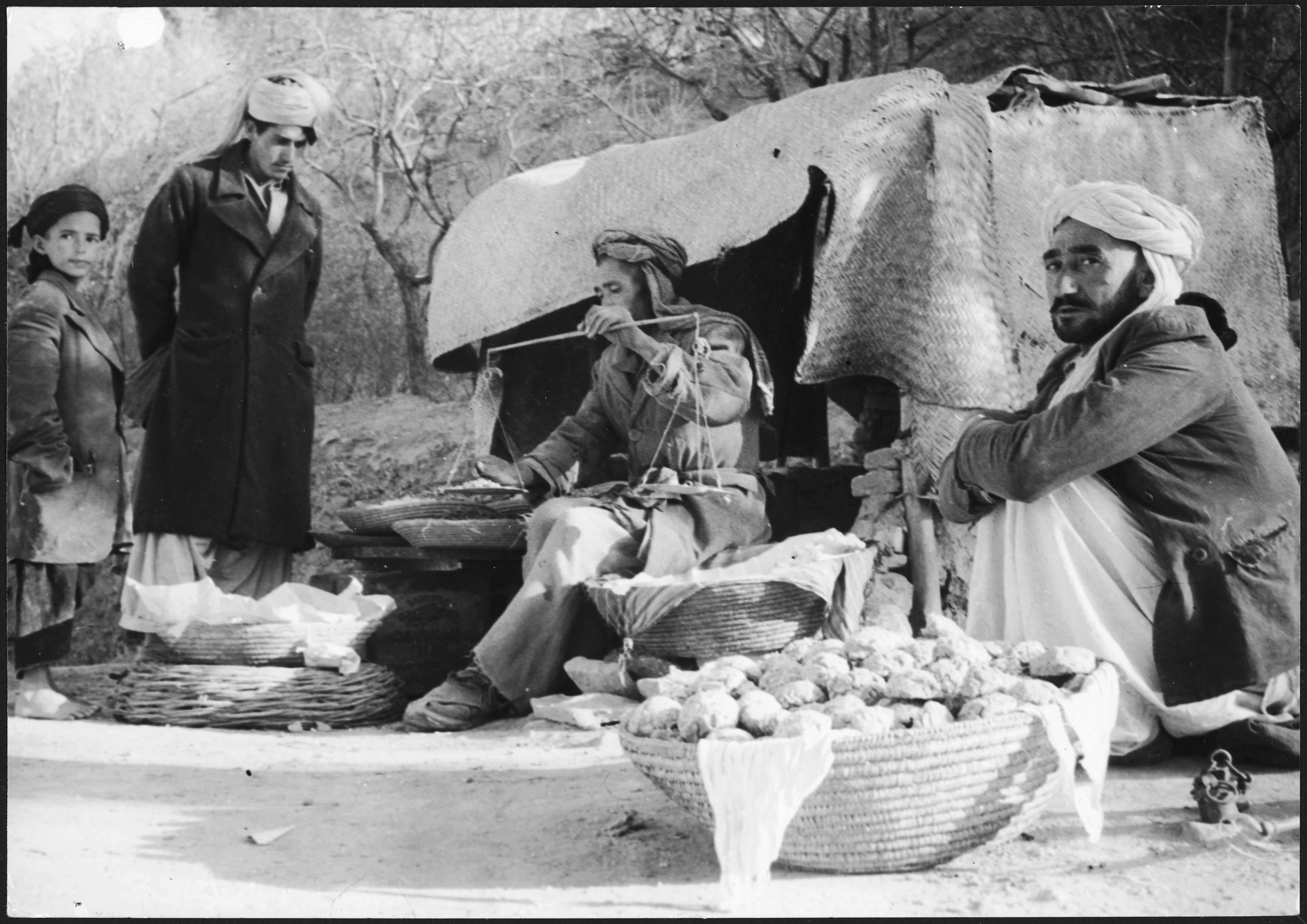 Afghanistan, Kabul: Menschen; Männer beim Abwägen von Waren vor einem Unterstand